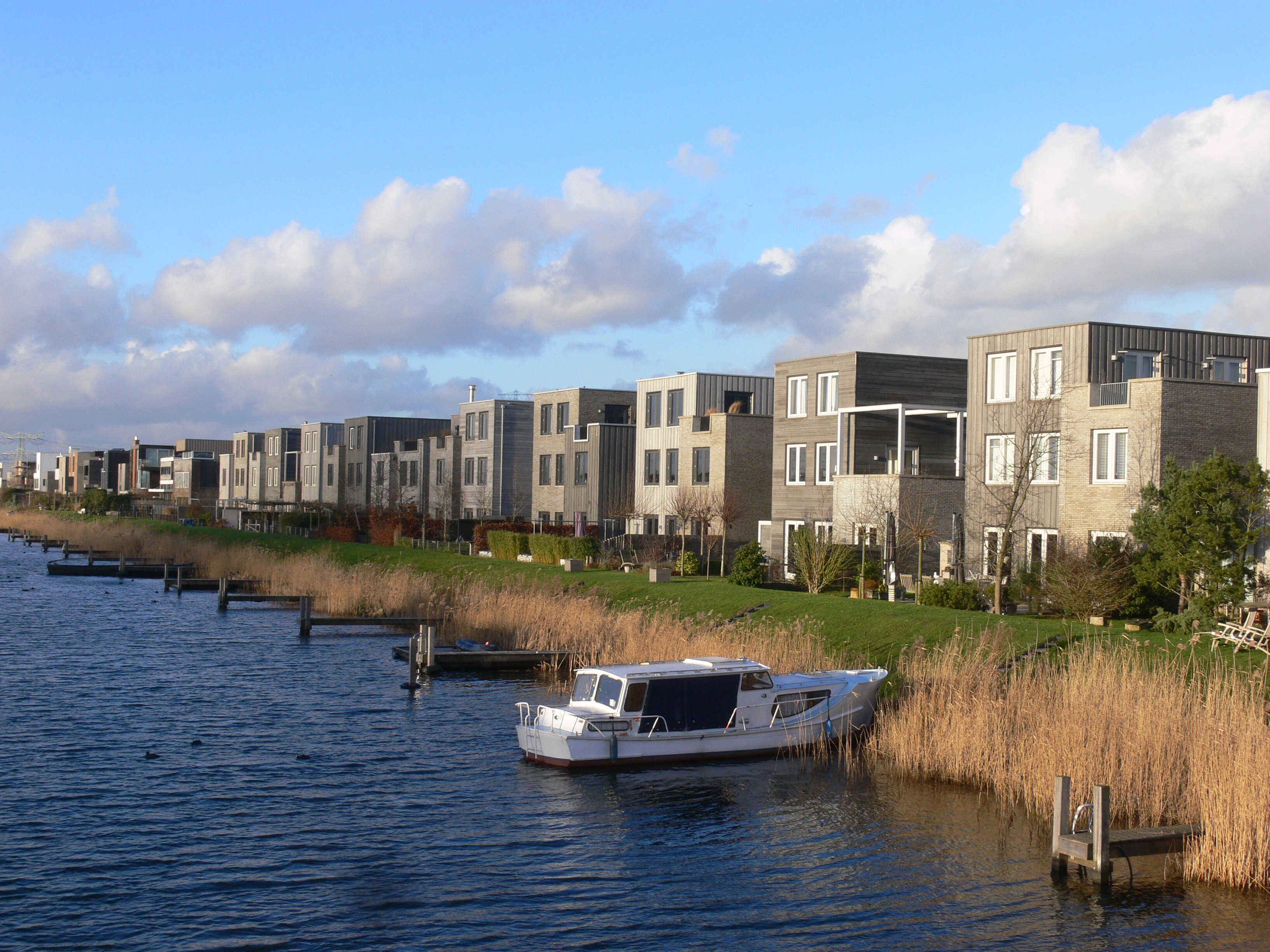 Paysage et maisons contemporaines du quartier d'IJburg, à Amsterdam